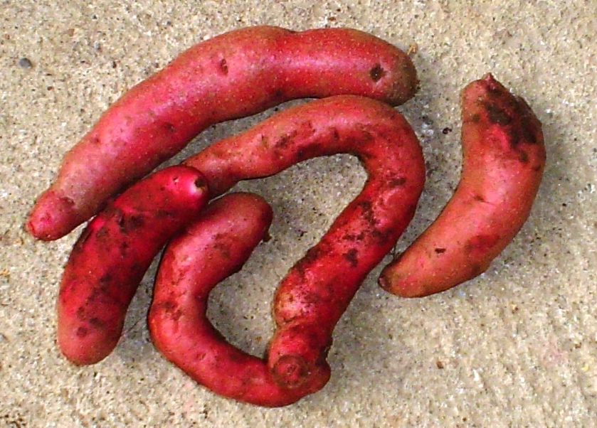 Tubérculos de papas (Solanum tuberosum subsp. tuberosum) de la variedad Michuñe, originaria de Chiloé.